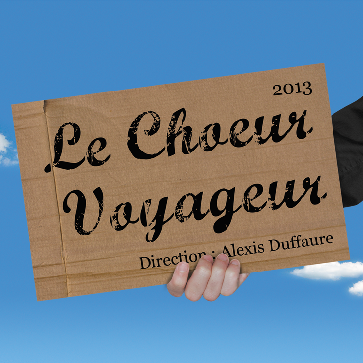 Pochette de l'album éponyme du Chœur Voyageur sorti en 2013.